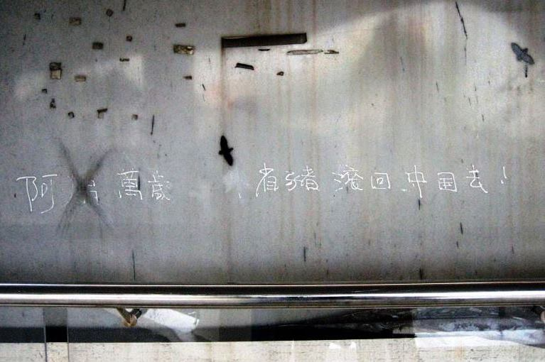 臺北市大安區和平東路與新生南路口天橋上的陳水扁支持者塗鴉「阿扁萬歲，外省豬滾回中國去」，在2008年陳水扁家庭密帳案爆發後已成笑料。2009年7月25日，前民主進步黨中央評議委員會主任委員許丕龍投書《聯合報》說，一直以來，民進黨依循著陳水扁「逢中必反」的基本教義路線，「任何人只要是與中國大陸有事業投資、有業務來往、有文化交流的，隨時都有可能成為十惡不赦的罪人而遭受攻擊」。2015年8月7日，世新大學通識教育中心主任李功勤說，陳水扁政府將「中國人、中國共產黨、中國」三個概念劃上等號，配合教科書宣教，造成臺灣對立加劇；旺旺集團總裁蔡衍明將上列三個概念分開，展現更高的格局，可謂「用心良苦」。